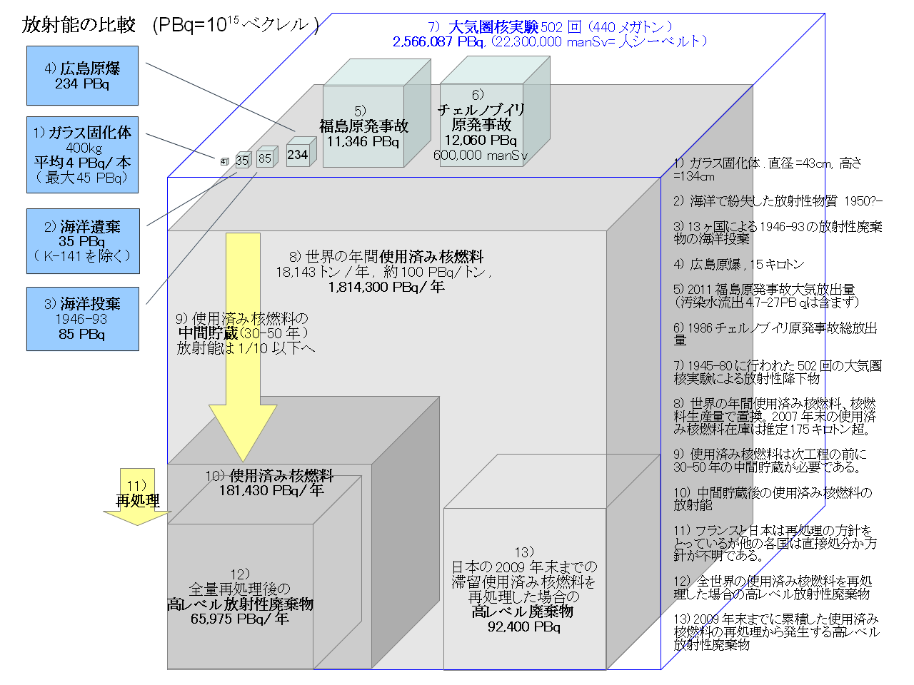 各種の放射能の比較、ガラス固化体から核実験による放射性降下物まで。